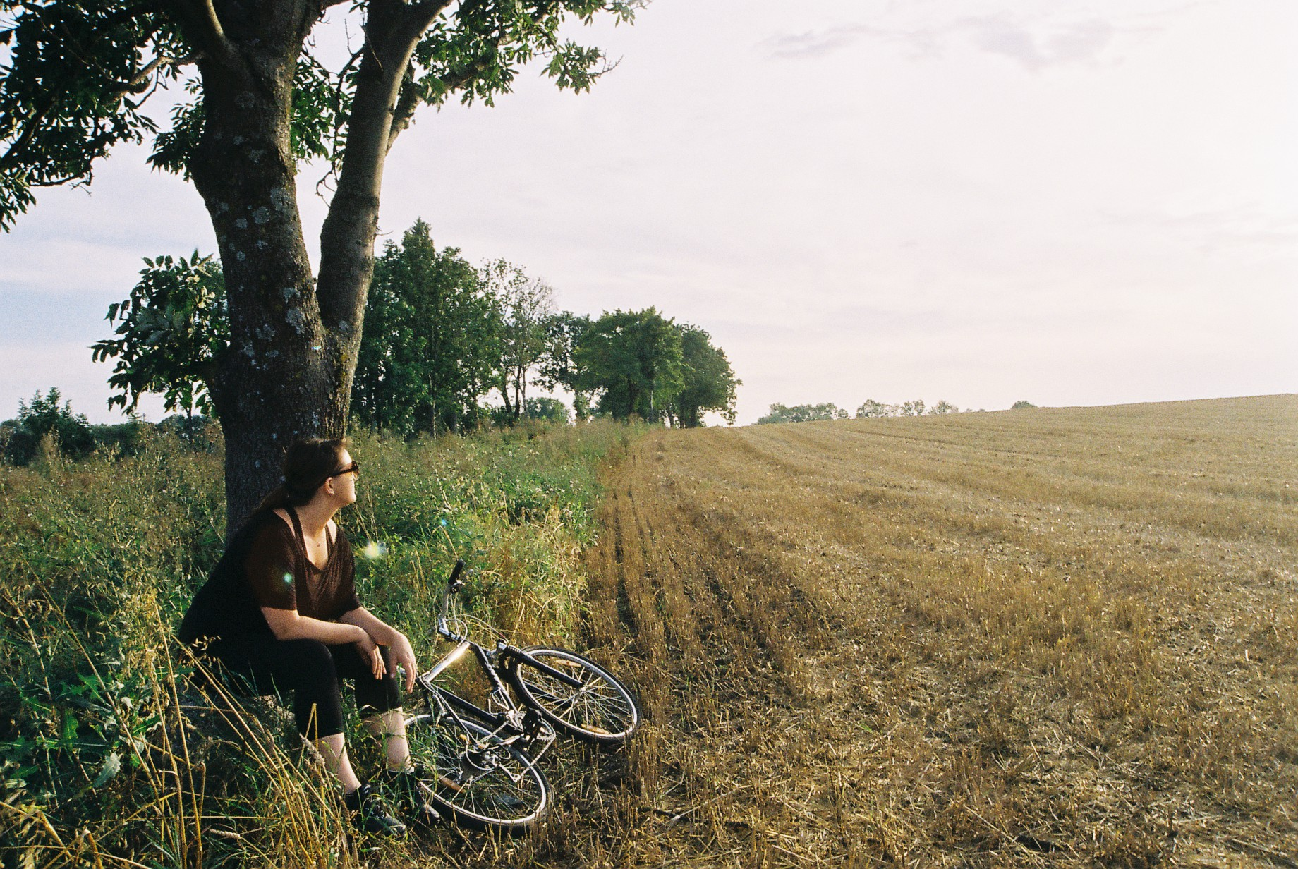 Piękne światło zachodzącego słońca, zdjęcie wykonane aparatem analogowym